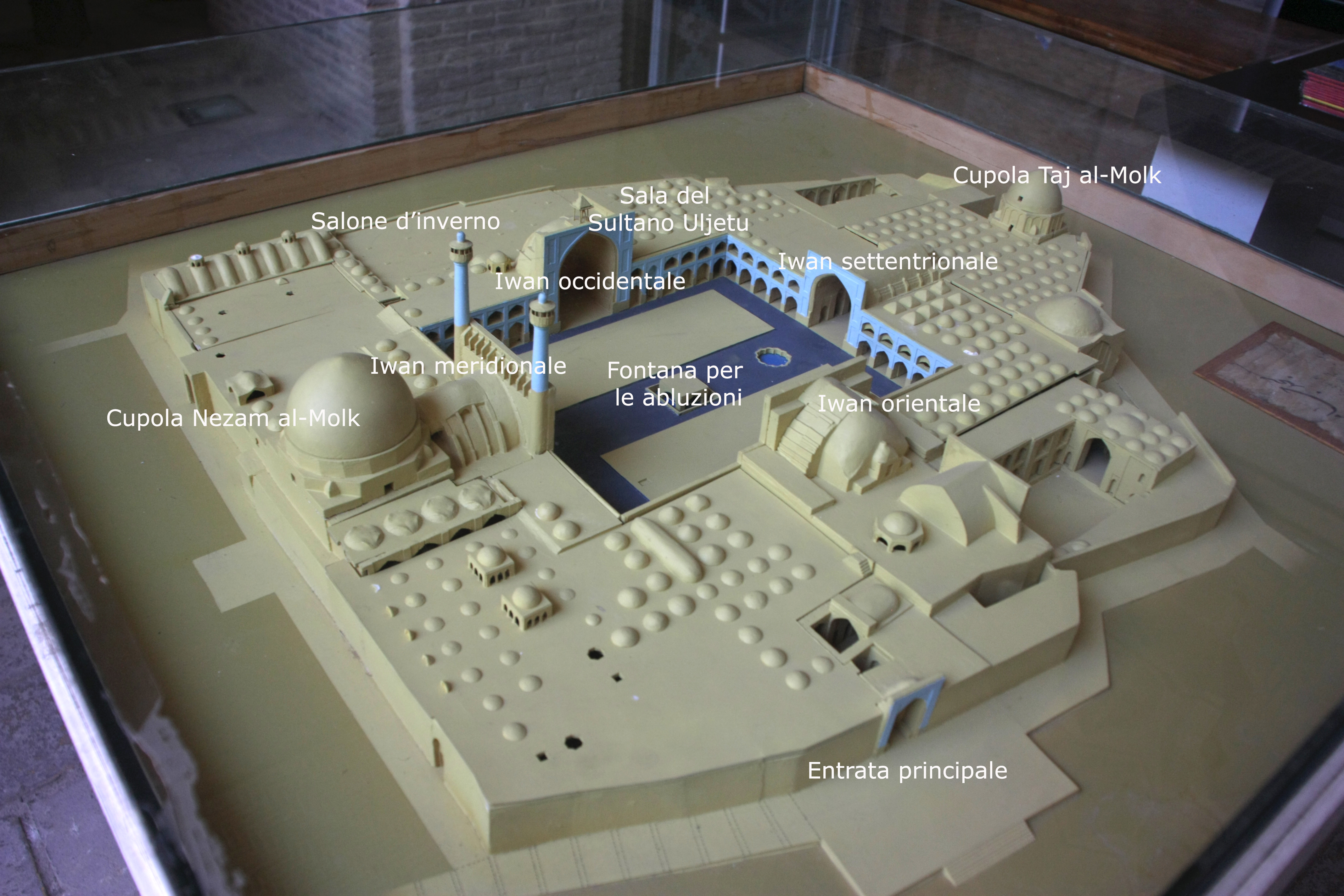 Con la descrizione